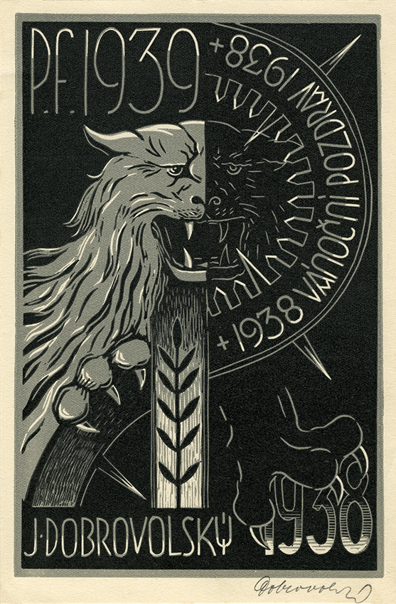 Jaroslav Dobrovolský: PF 1939, 1938, barevný dřevoryt